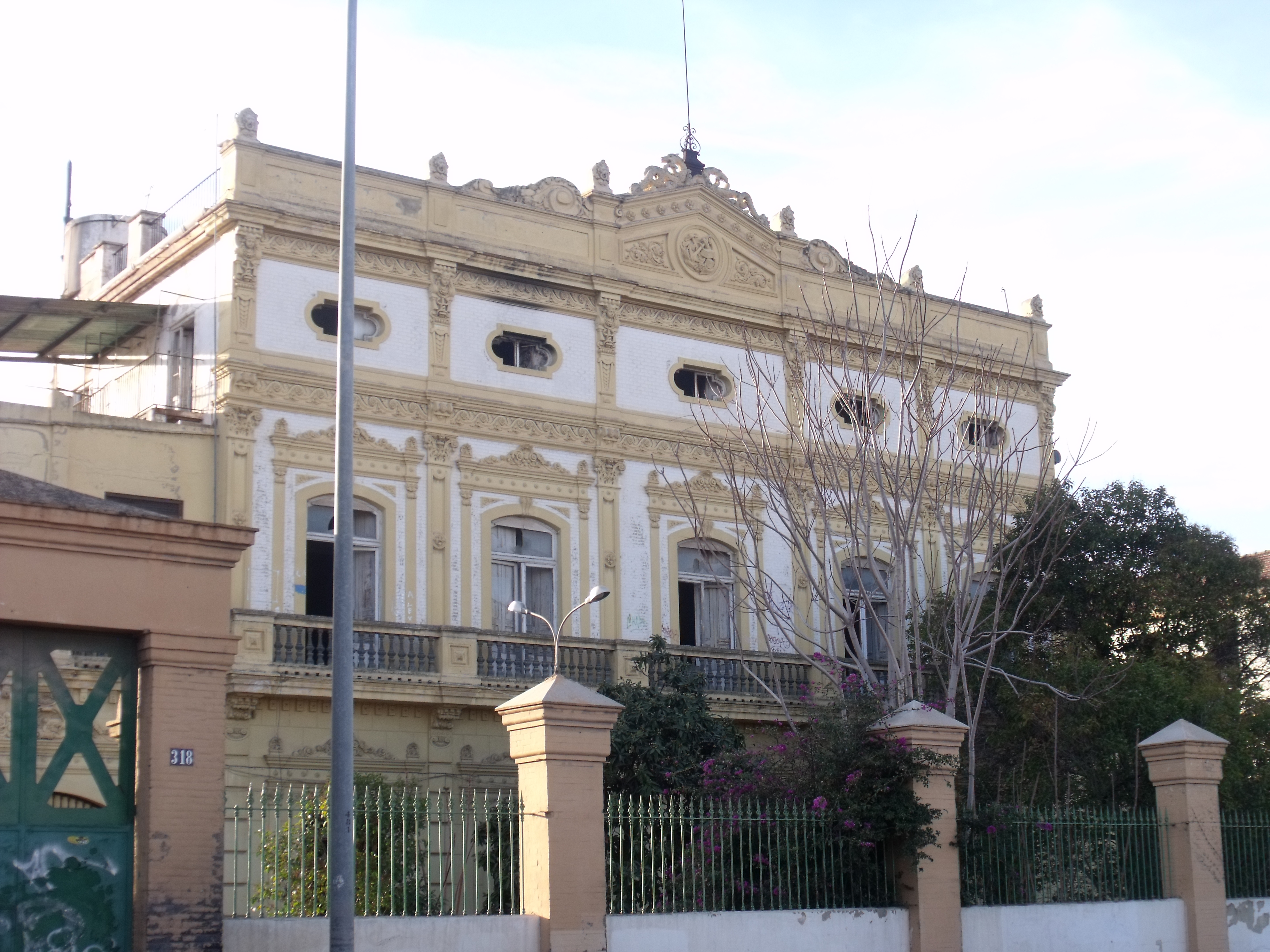 Parque de Artillería, calle San Vicente Mártir nº 318, Valencia